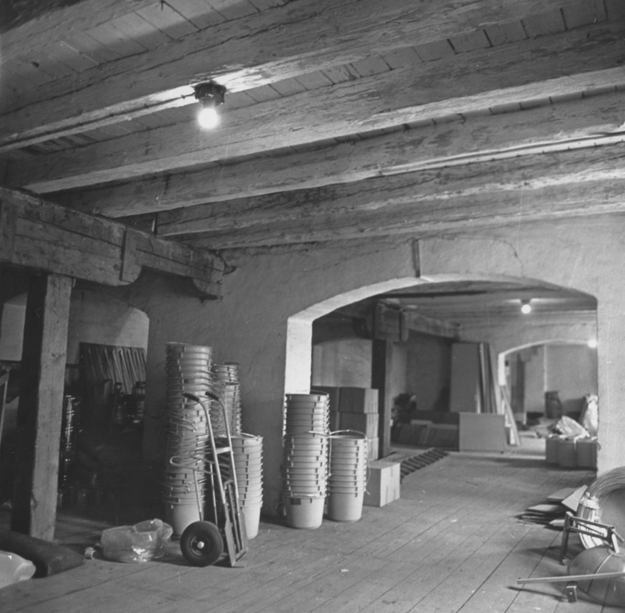 Interiör av magasin som 1971 innehöll "Bygg-Göta". Byggår 1878, med möjligen ingående av äldre byggnad. Byggherre 1878 Stockholms Södra Ångqvarns o Vedsågeri AB.